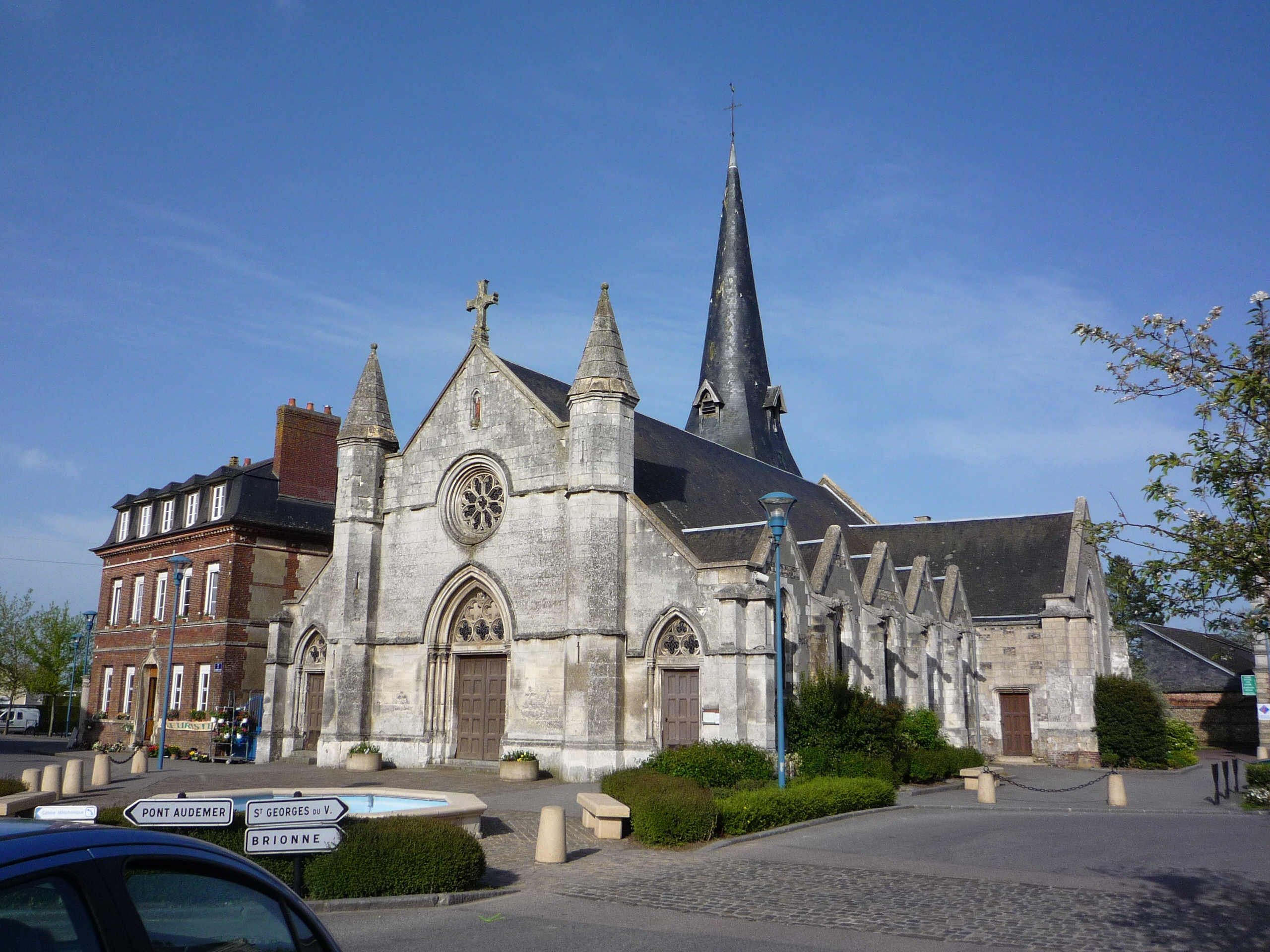 Eglise de Lieurey